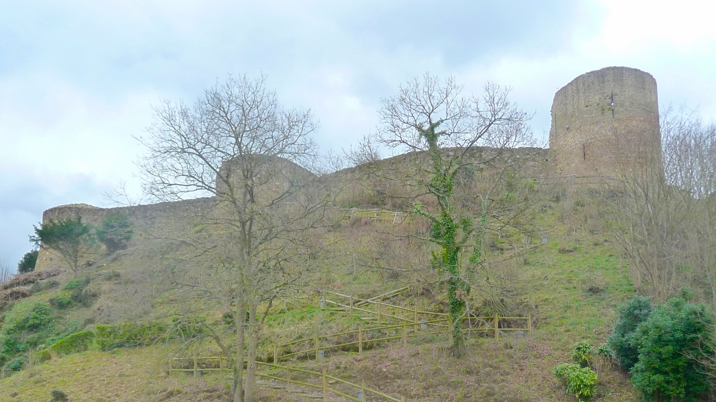 Ruine du chateau de Léhon